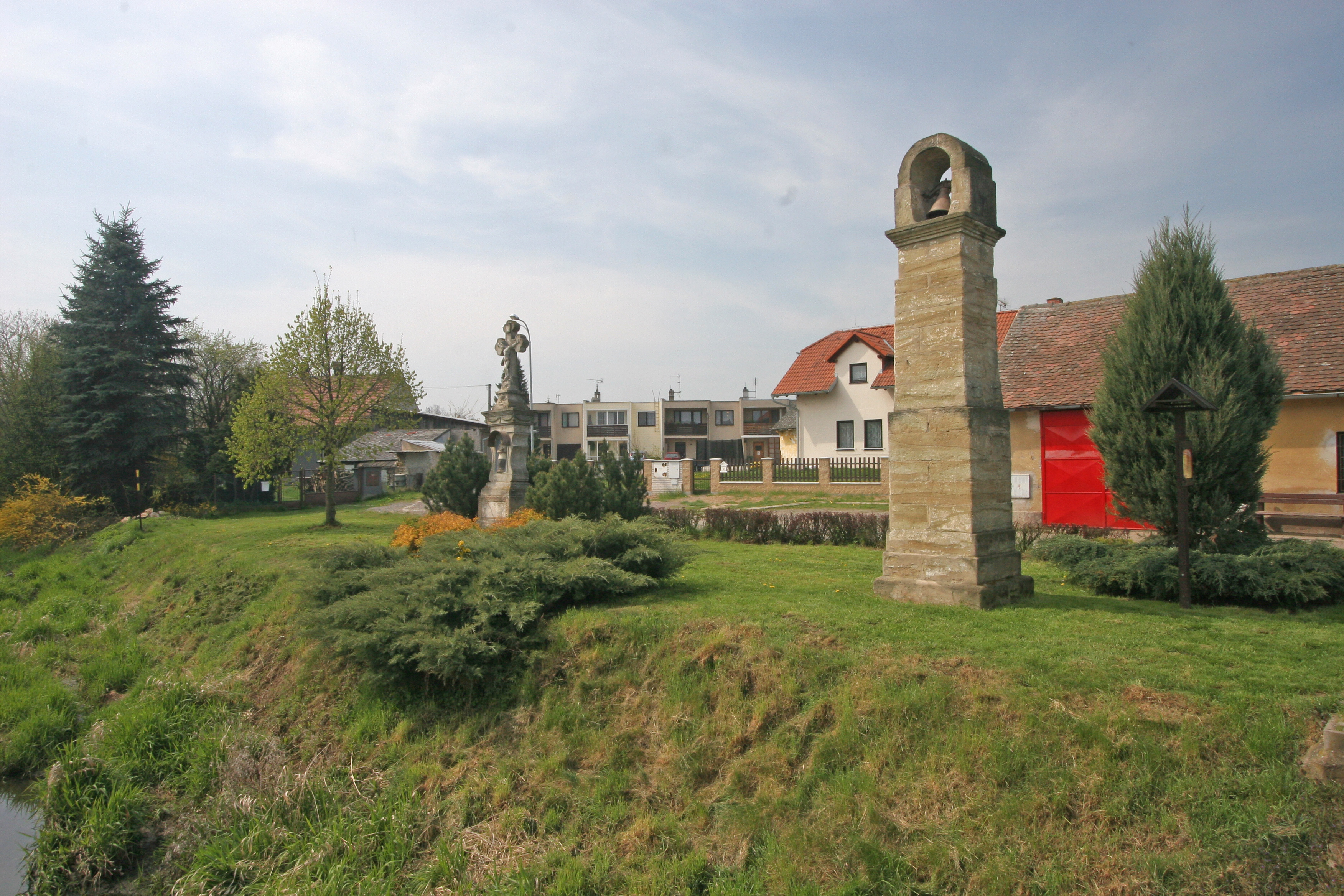 Klešice zvonička